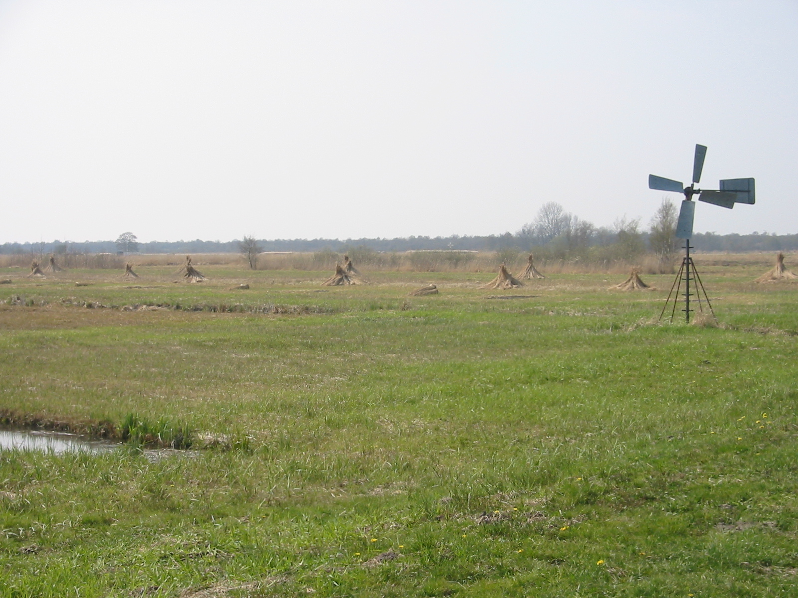 eigen foto. GerardM 15 apr 2004 18:10 (CEST)